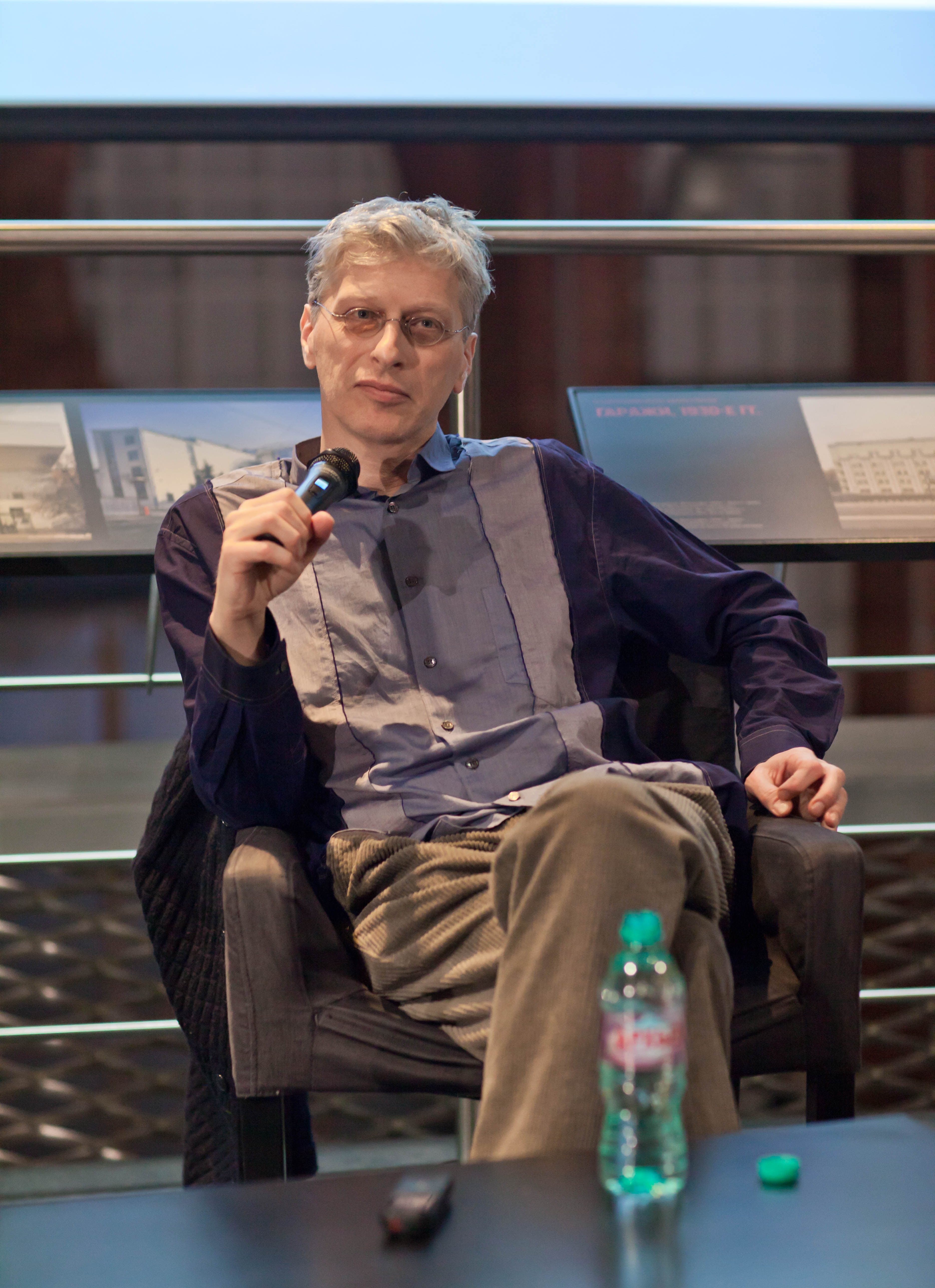 Сергей Ливнев и Дмитрий Быков на предпремьерном показе фильма С. Ливнева "Ван Гоги" в Еврейском музее и центре толерантности